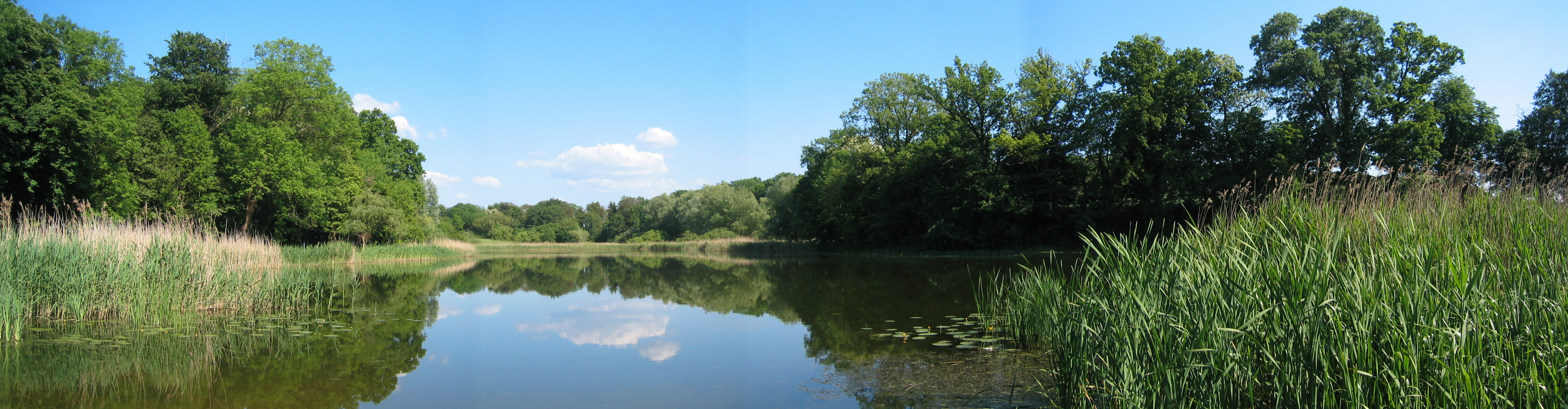 Haussee in Polßen in der Uckermark.